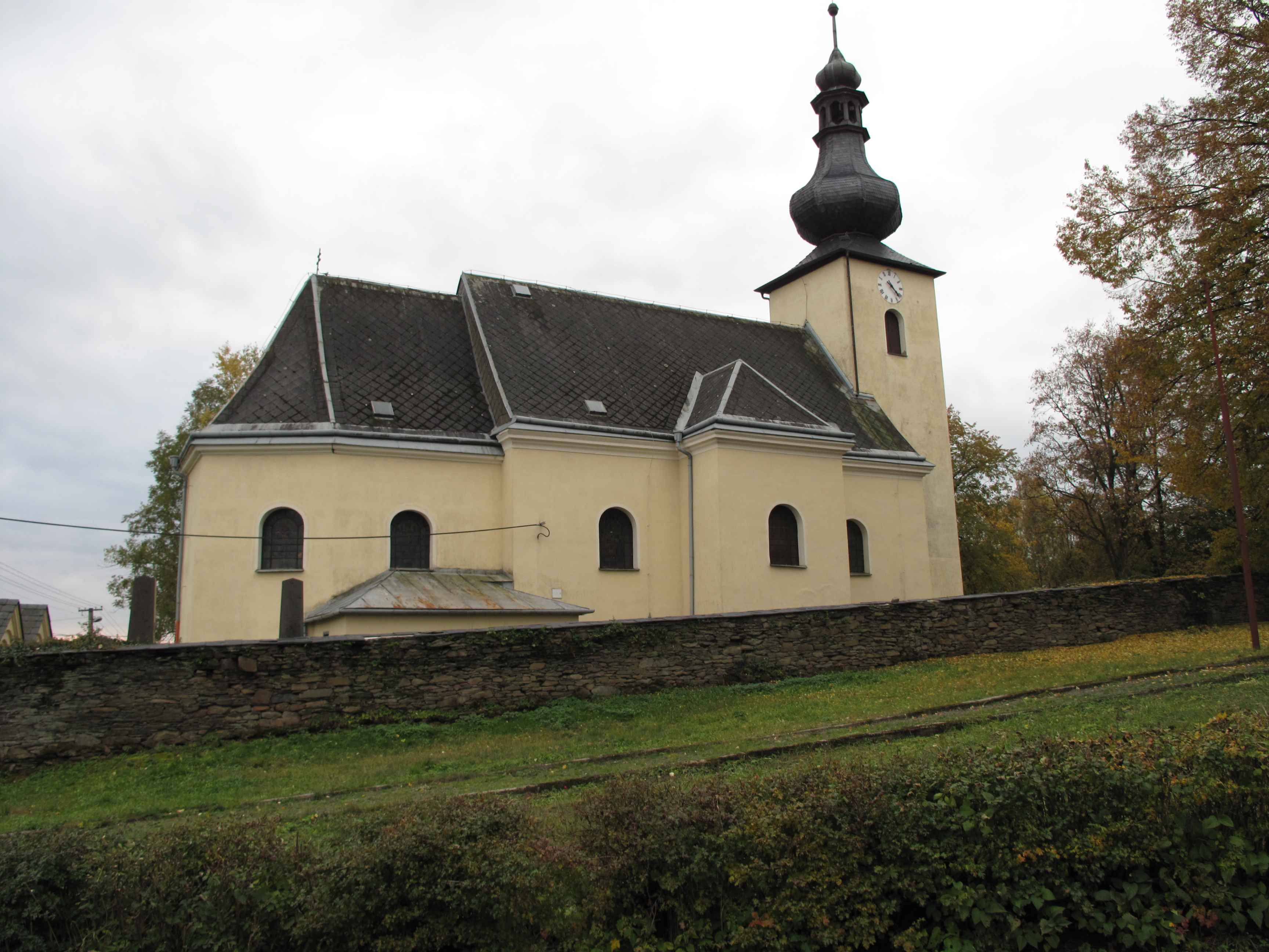 Svatoňovice. Okres Opava, Česká republika.